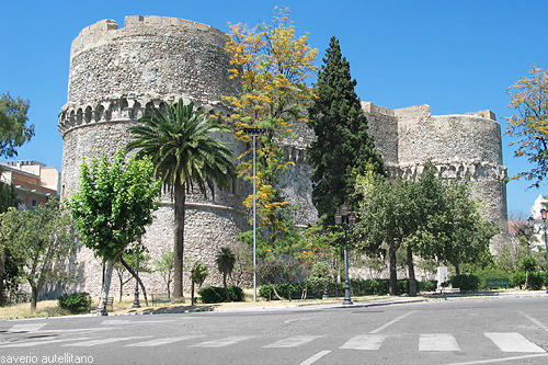 Piazza Castello a Reggio Calabria. Foto concessa dall'Autore - Saverio Autellitano, - purchè se ne citi e se ne riconosca la paternità anche su opere derivate.